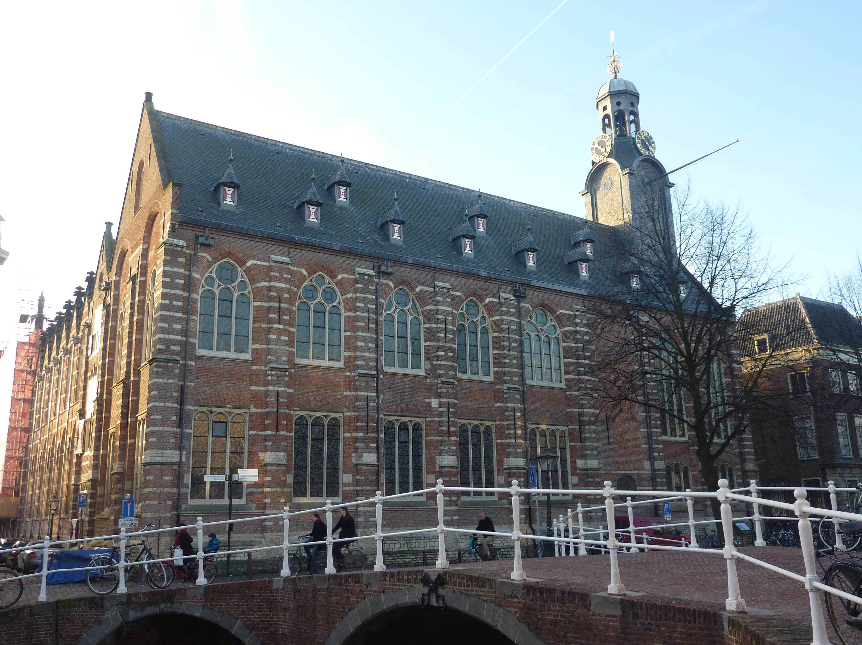 Leiden, Rapenburg